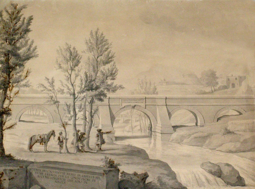 Il Ponte nuovo di Luigi Vanvitelli